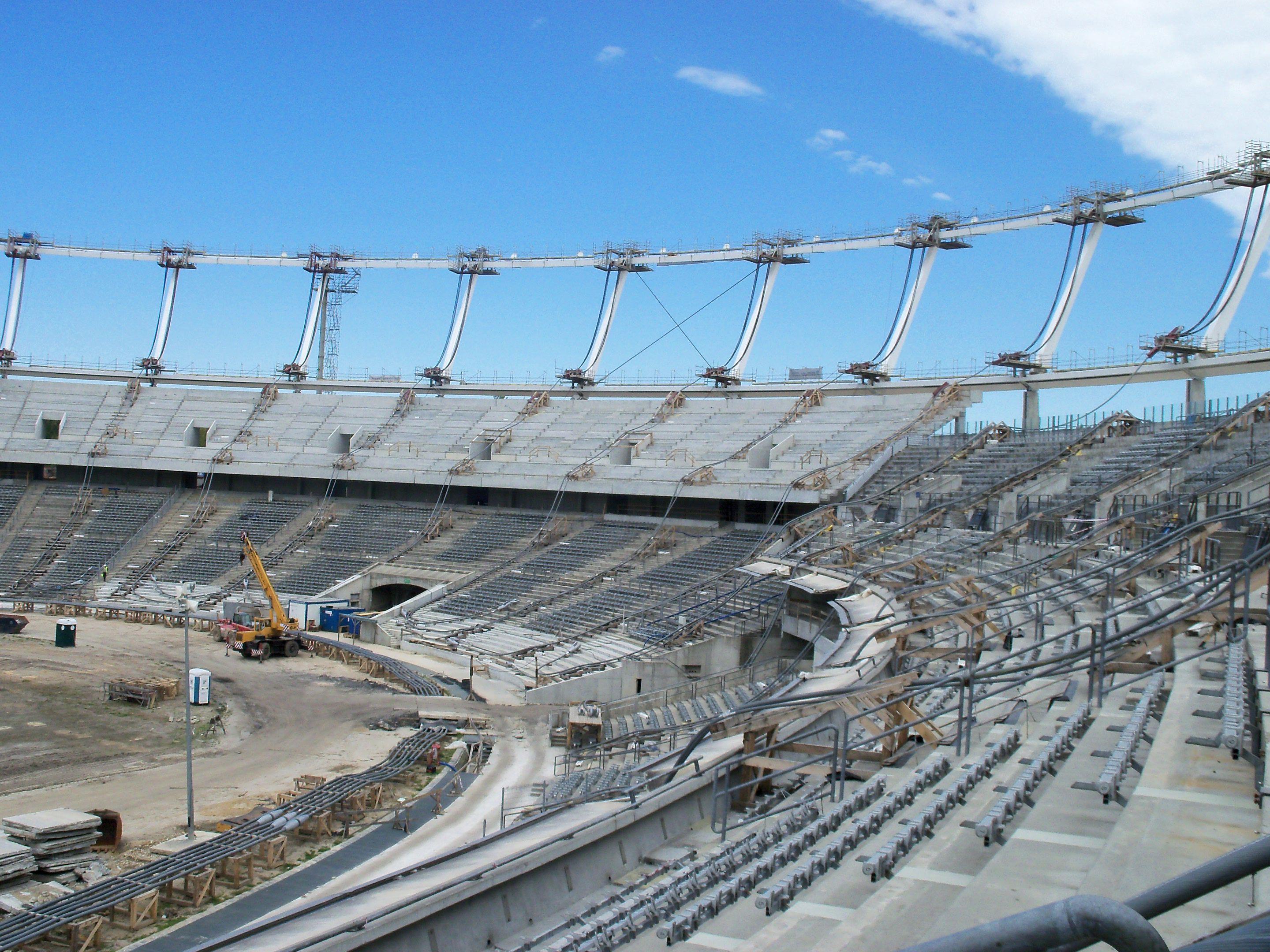 Przebudowa Stadionu Śląskiego w Chorzowie (maj 2011)